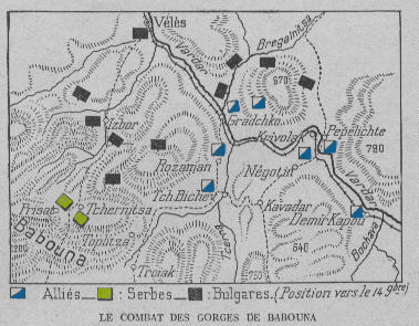 carte_de la bataille de la Babouna_16_déc_1915